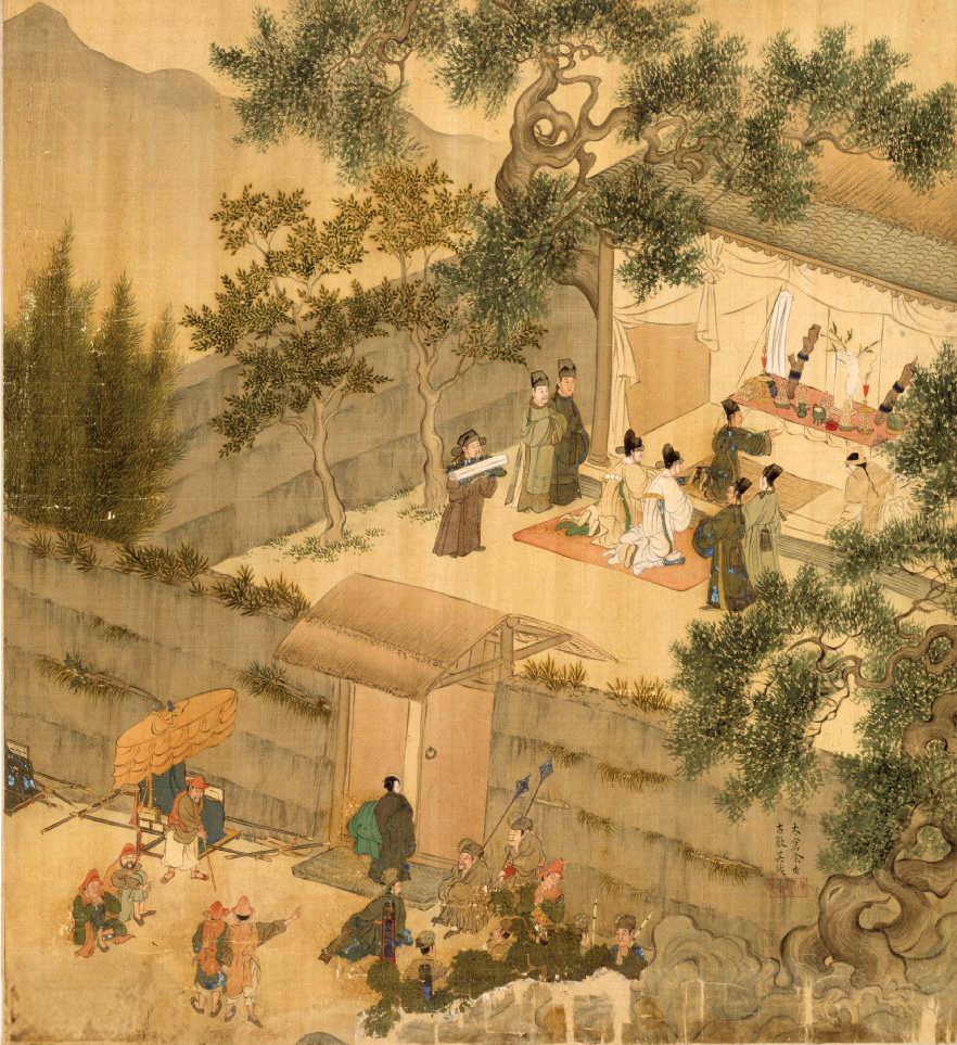 郡尊折節，時年二十五